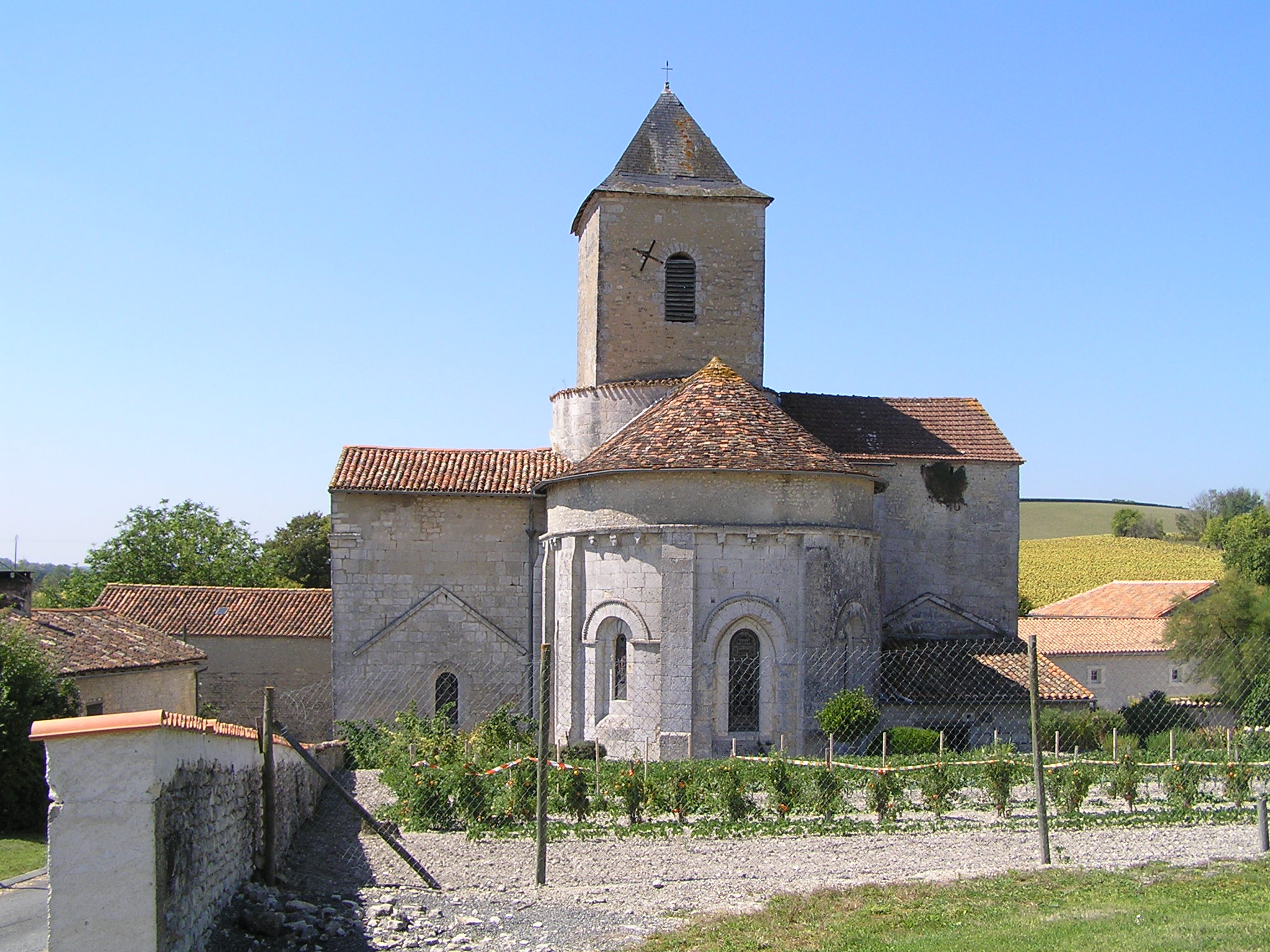 église de Mainfonds, Charente, France